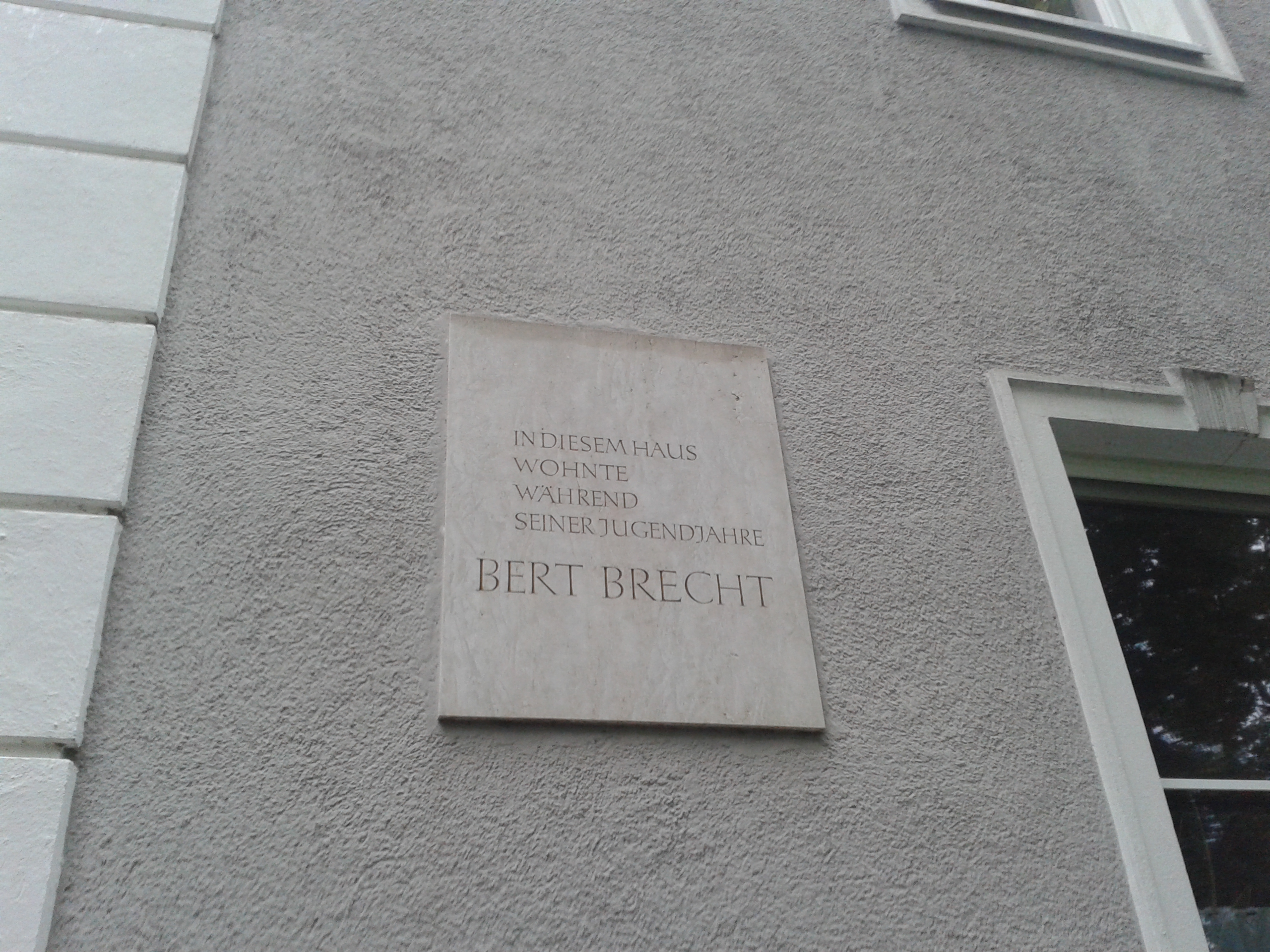 Gedenktafel (Bert Brecht) an Haindl’schen Stiftungshaus in der Bleichstraße (Augsburg)